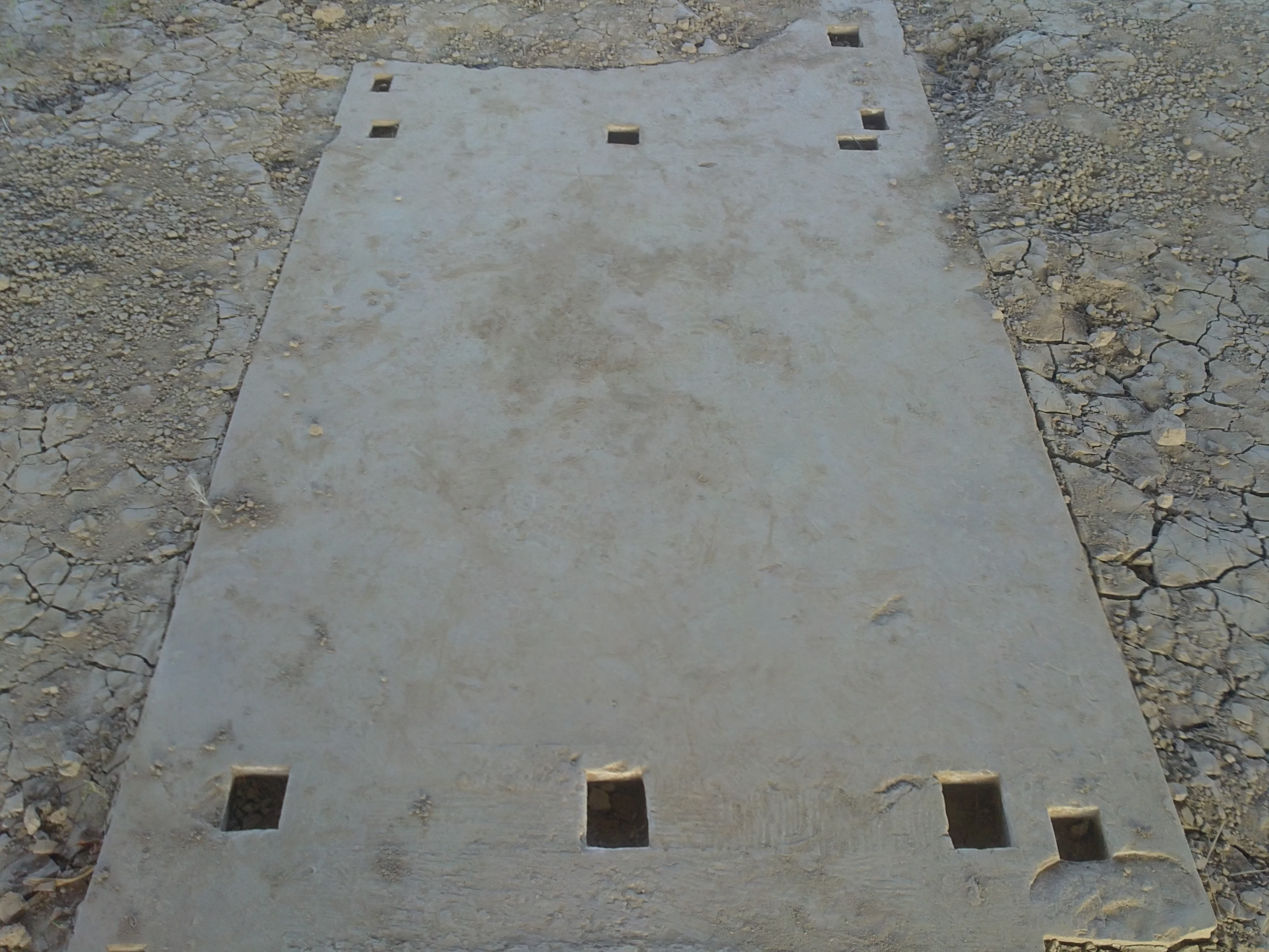 تالار اصلی با لعابی از جنس سیلیس کف‌سازی شده است. 10 پایه ستون کوچک در تالار اصلی کاخ پیدا شده است